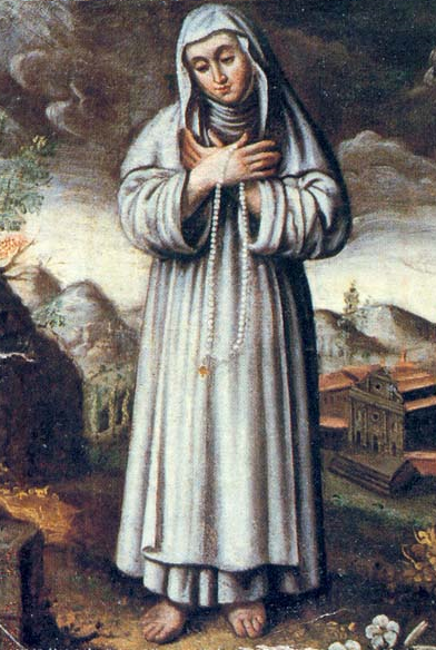 Raffigurazione della Devota Margherita Particolare dell'immagine della Devota Margherita Antoniazzi in un dipino del '600